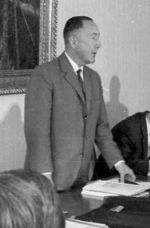 im Landeshaus zum Thema Raumordnung. Im Bild u.a. Ministerpräsident Helmut Lemke (1.v.l.), Bundeswohnungsbauminister Paul Lücke (2.v.l.) und CDU-Fraktionschef Walter Mentzel (3.v.l.).